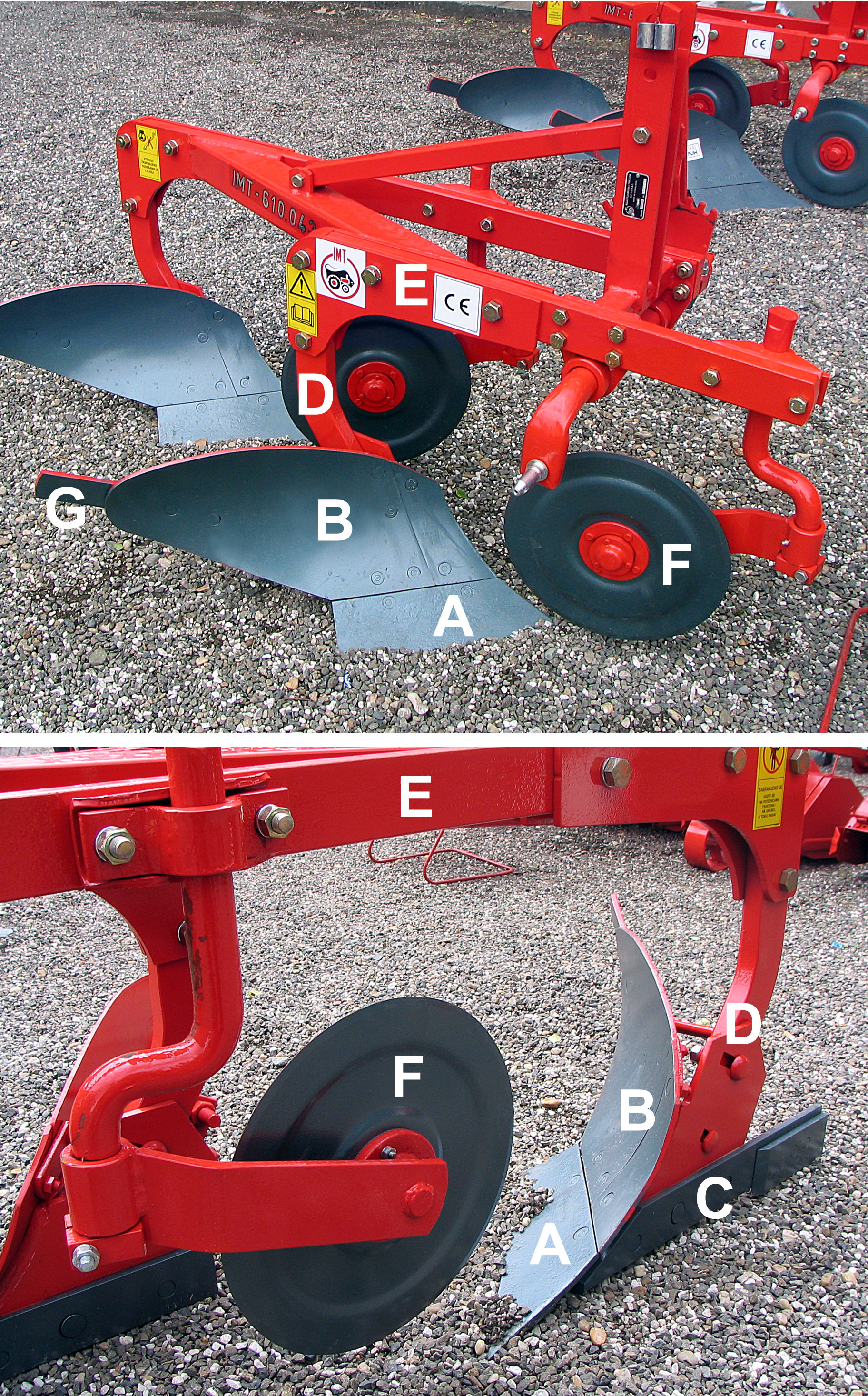 Делови плуга. Пољопривредни сајам у Новом Саду (фото: Михаило Грбић)